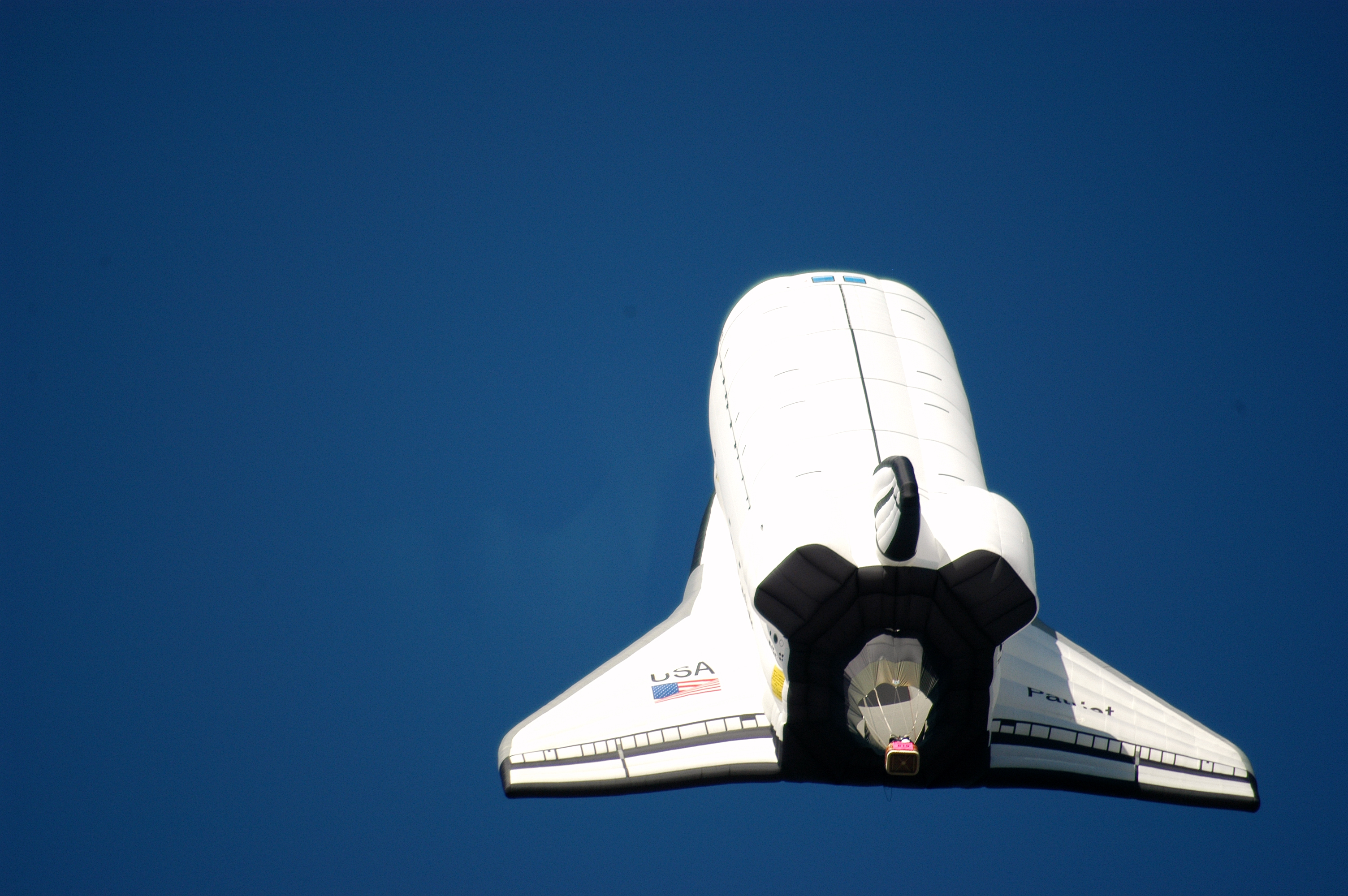 Heißluftballon in Form eines Space-Shuttles